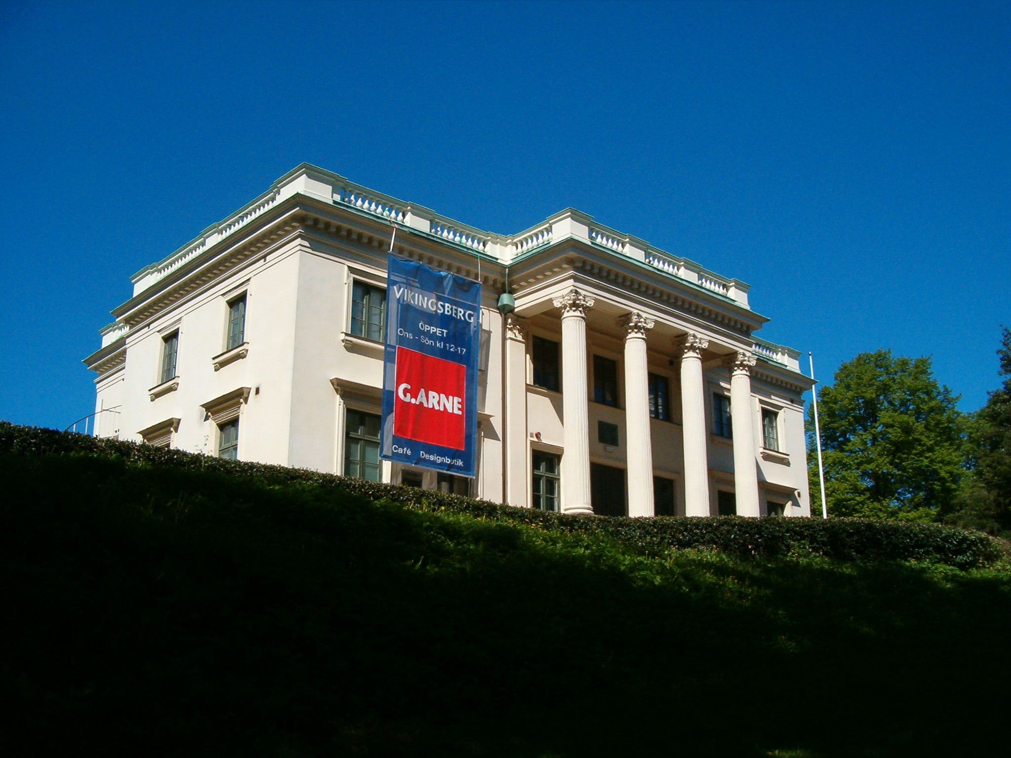 Vikingsberg art gallery in Helsingborg, Sweden.